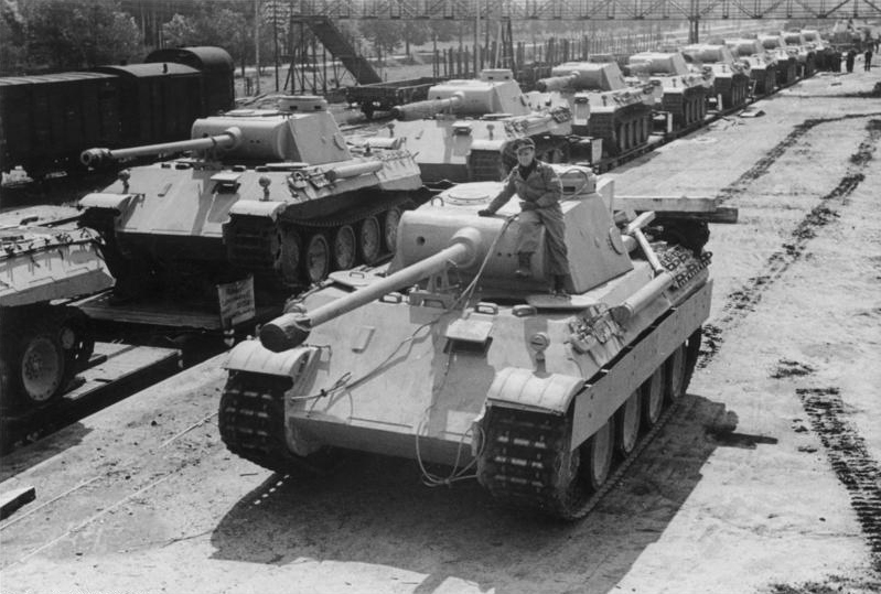 Zentralbild, II. Weltkrieg 19139-45 Der von der faschistischen deutschen Wehrmacht während des Krieges entwickelte neue Panzerkampfwagen Typ "Panther". UBz: die Verladung neuer "Panther"-Panzerkampfwagen zum Transport an die Front (1943).